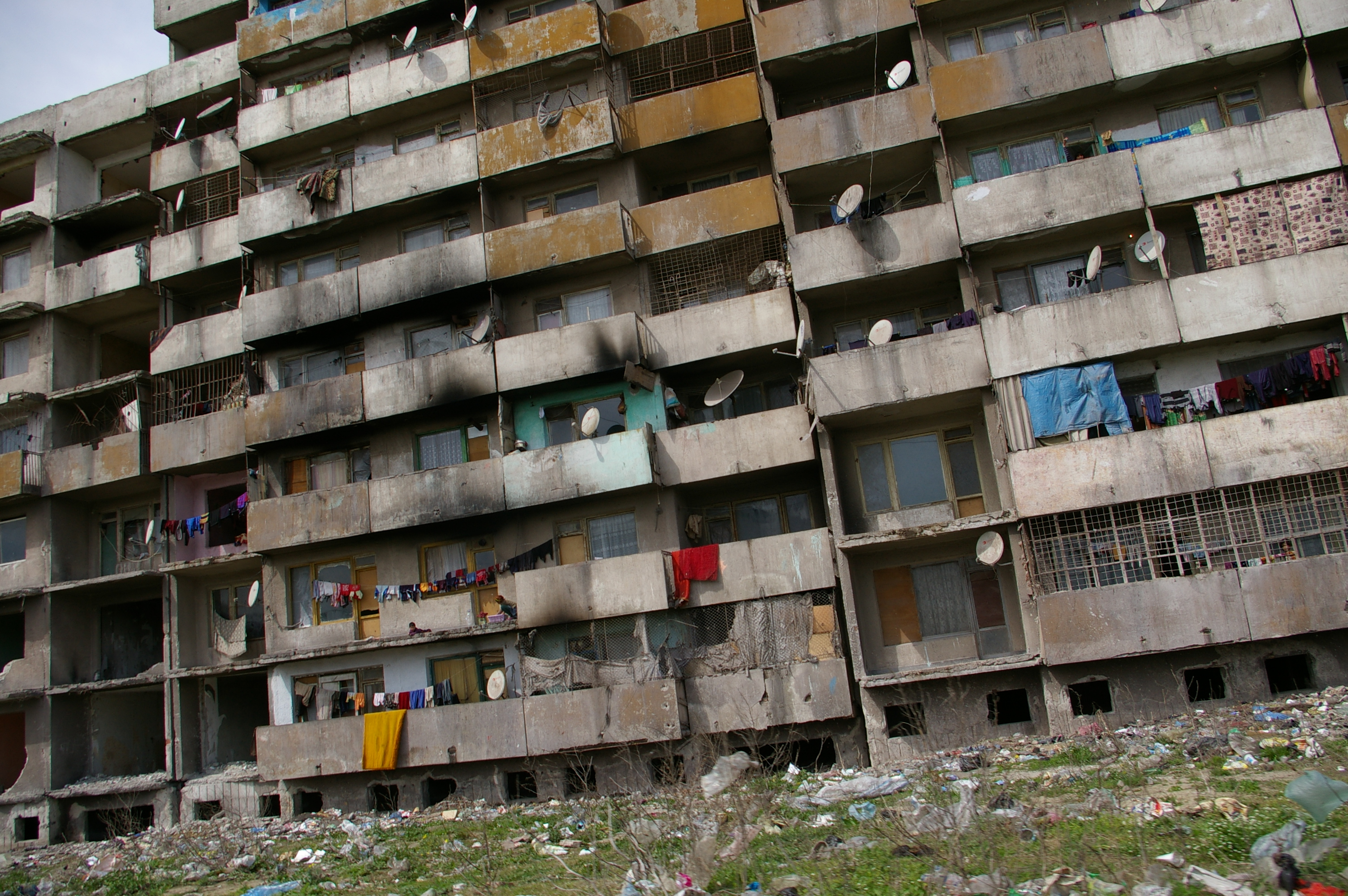 блок 20 в Ямбол , снимка от април 2010 преди да го съборят